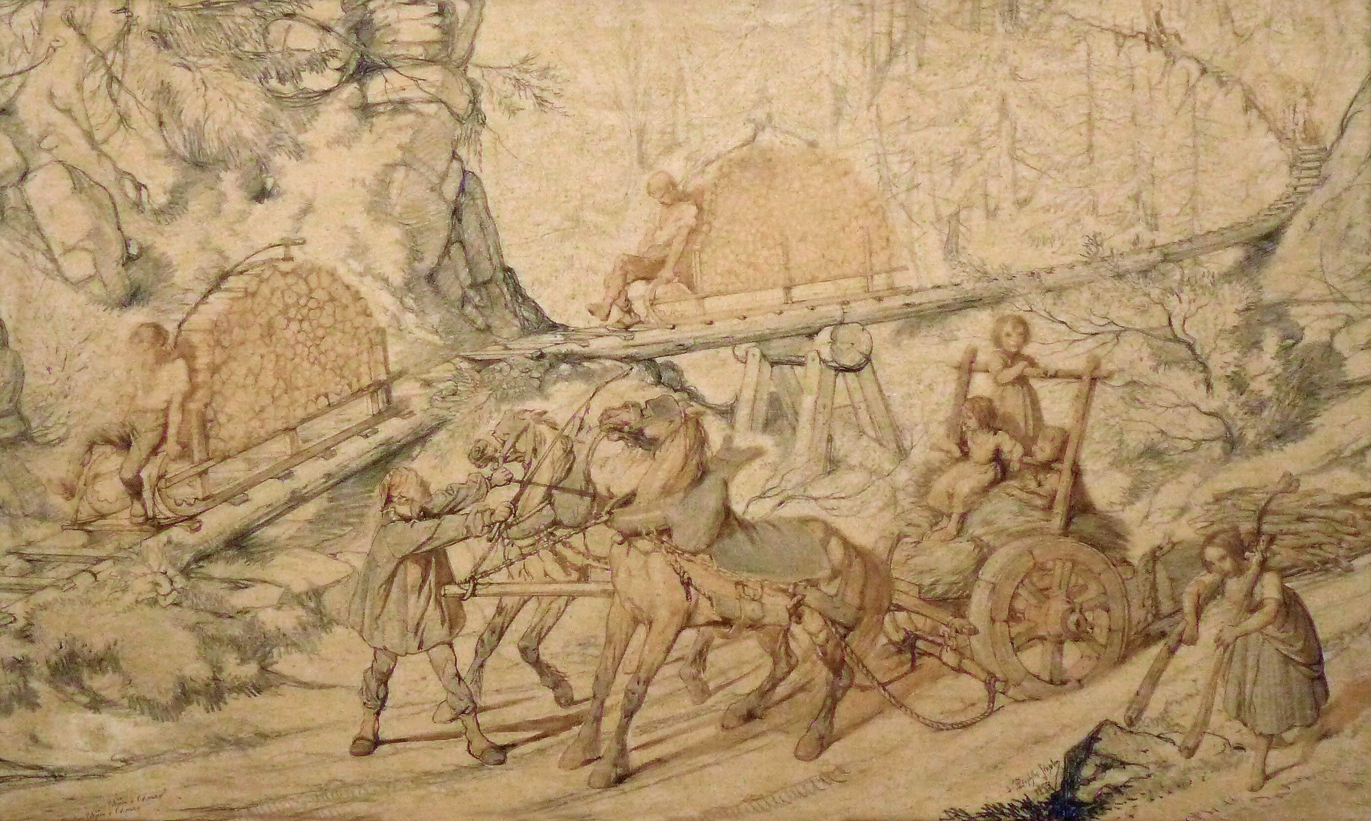 Théophile Schuler, Les Schlitteurs des Vosges, 1859, fusain et aquarelle, 100 x 164,5 cm. Musée Unterlinden, Colmar.